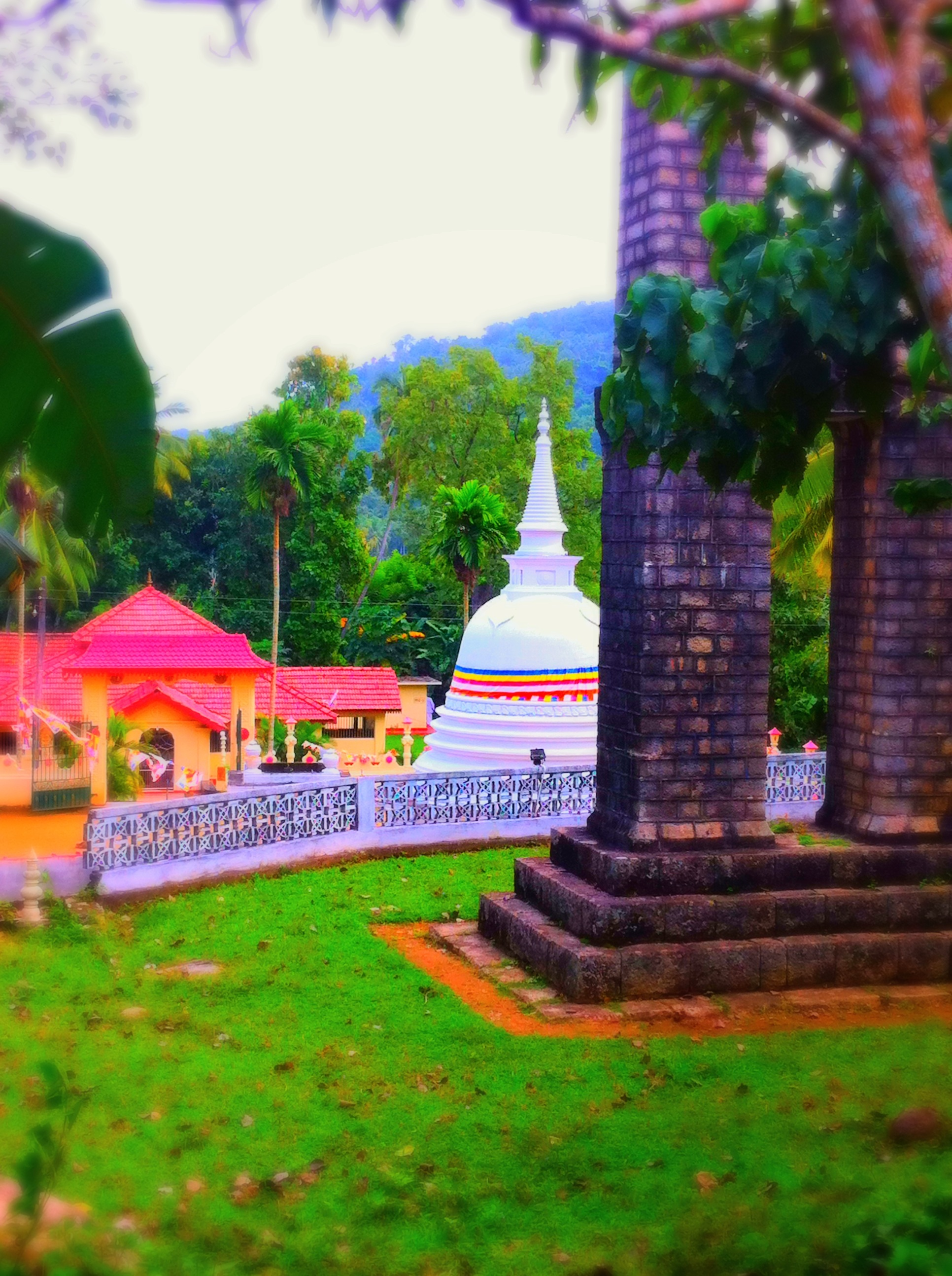 Sri Babilawanarama Temple